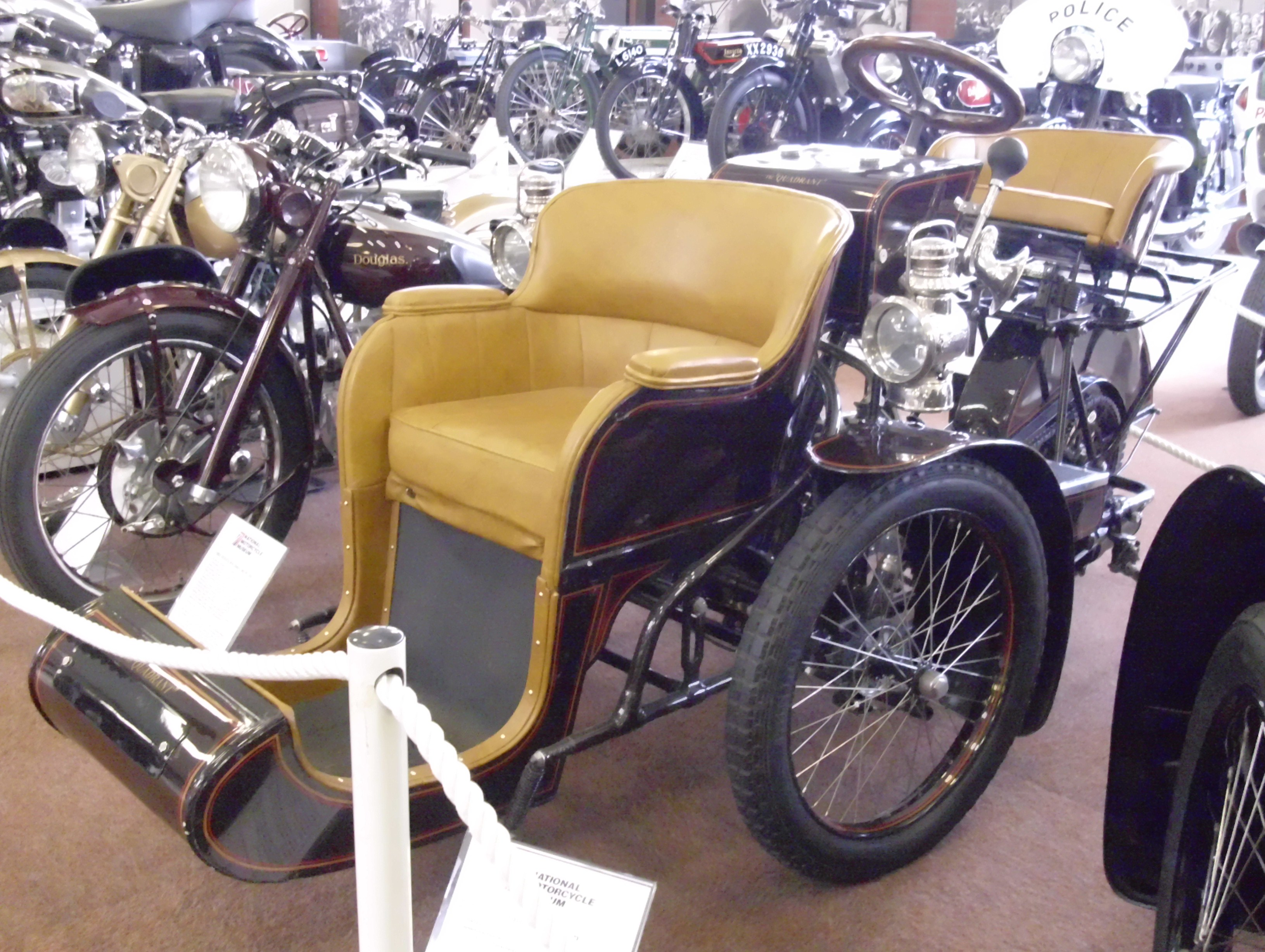 Quadrant Forecar 1904